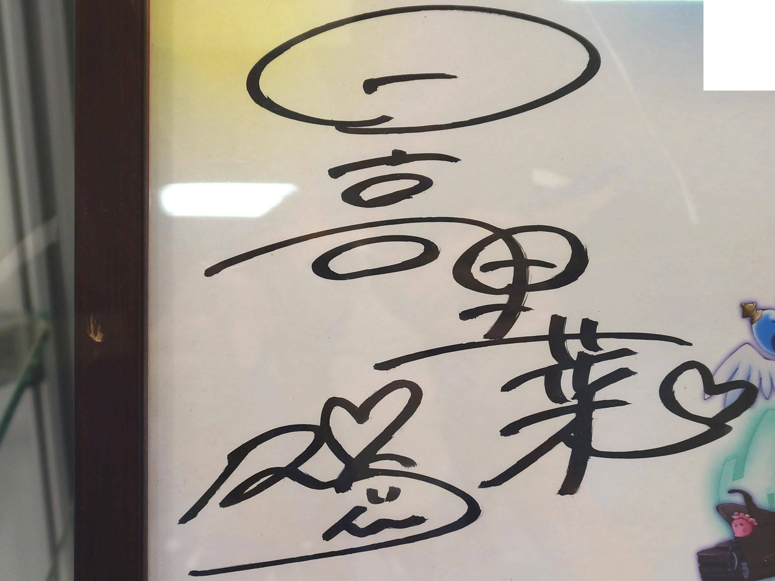 中文（台灣）: 第20屆漫畫博覽會，「漫畫博覽會歷屆名師簽繪手稿展」展示的日高里菜簽名。